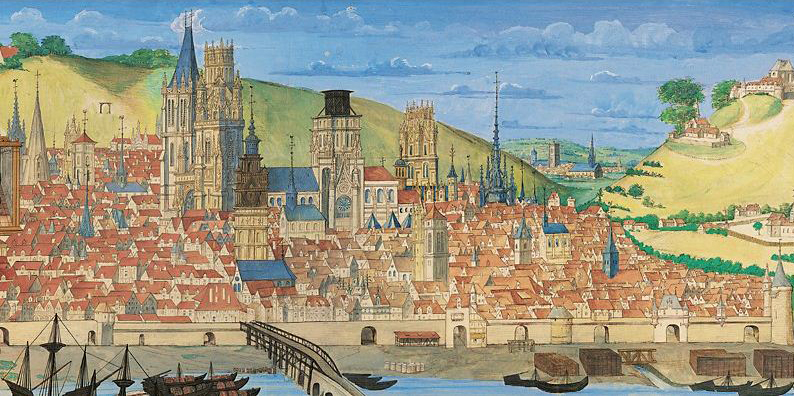 Вид на Руан (фрагмент, на котором изображён собор Нотр-Дам и окружающий его район). Фронтиспис из книги Le Livre des Fontaines (1526). Автор Jacques Le Lieur. Франция, Руан, Муниципальная руанская библиотека